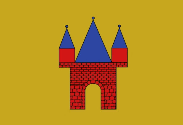 Flaga Jarocina